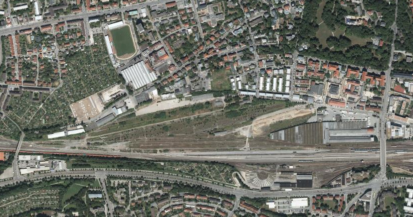 Luftaufnahme der Bayerischen Vermessungsverwaltung: Fläche des ehemaligen Güterbahnhofs, dann Bauprojekt Dörnberg-Viertel, in Regensburg, Bayern.